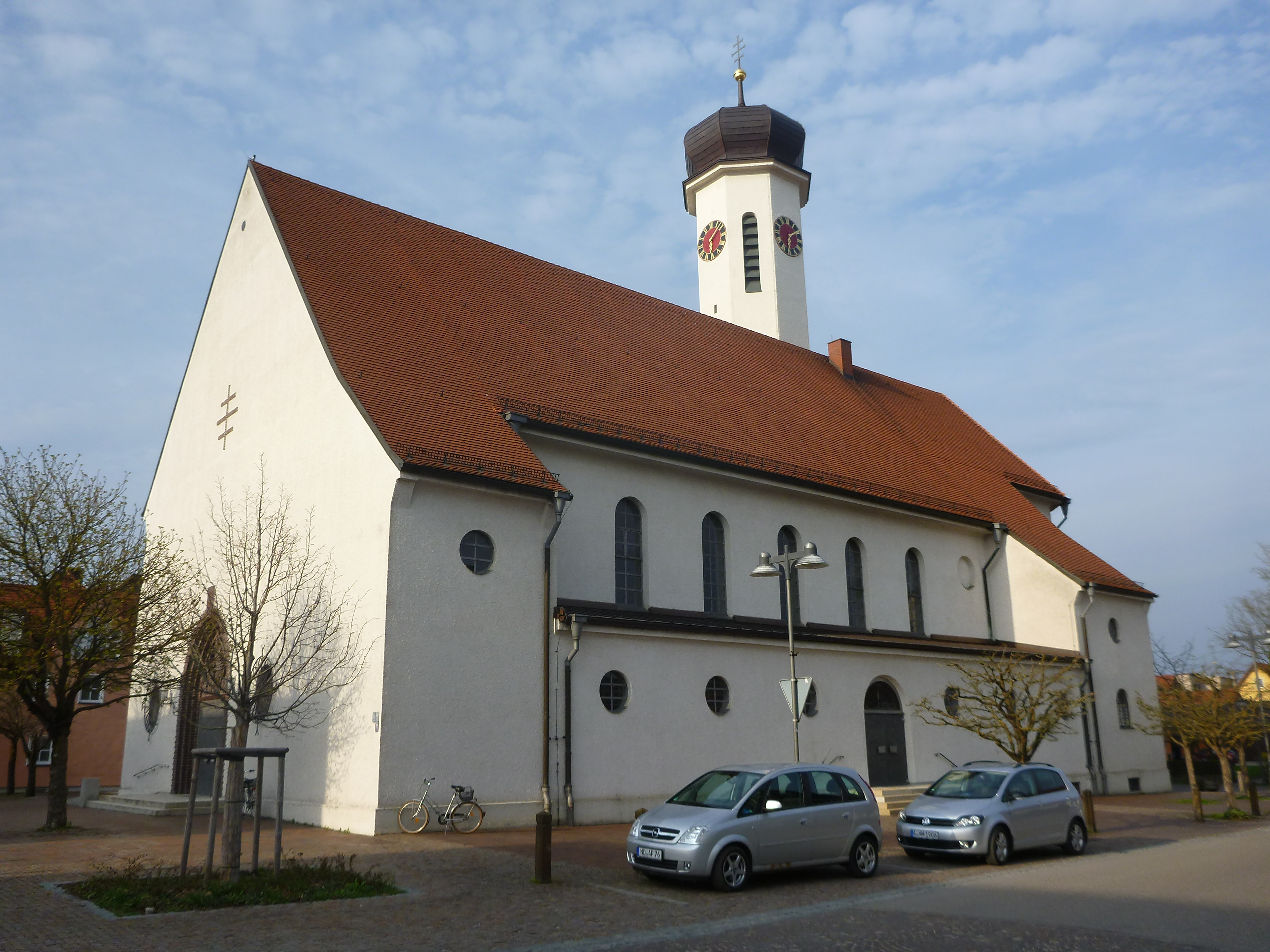 Katholische Pfarrkirche St. Wolfgang Meitingen, 1929/30 von H. Lederer erbaut; mit Ausstattung. Nordwestansicht